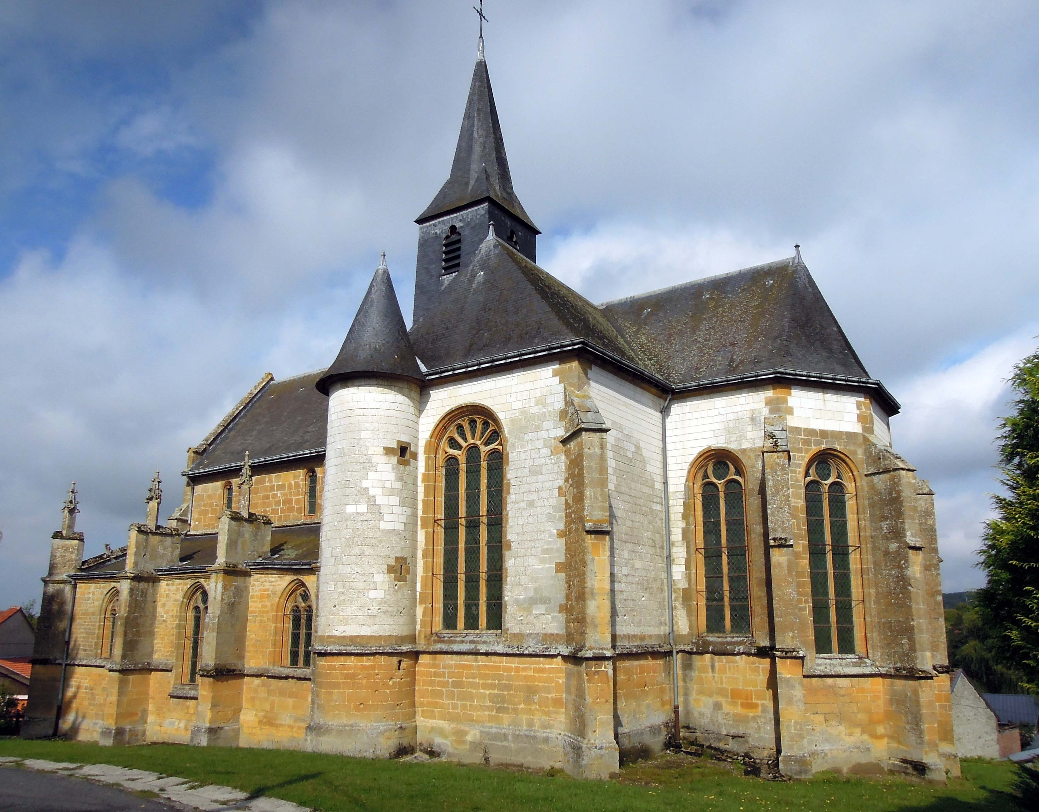 Église Saint-Pierre-aux-Liens, (Classé, 1913) .